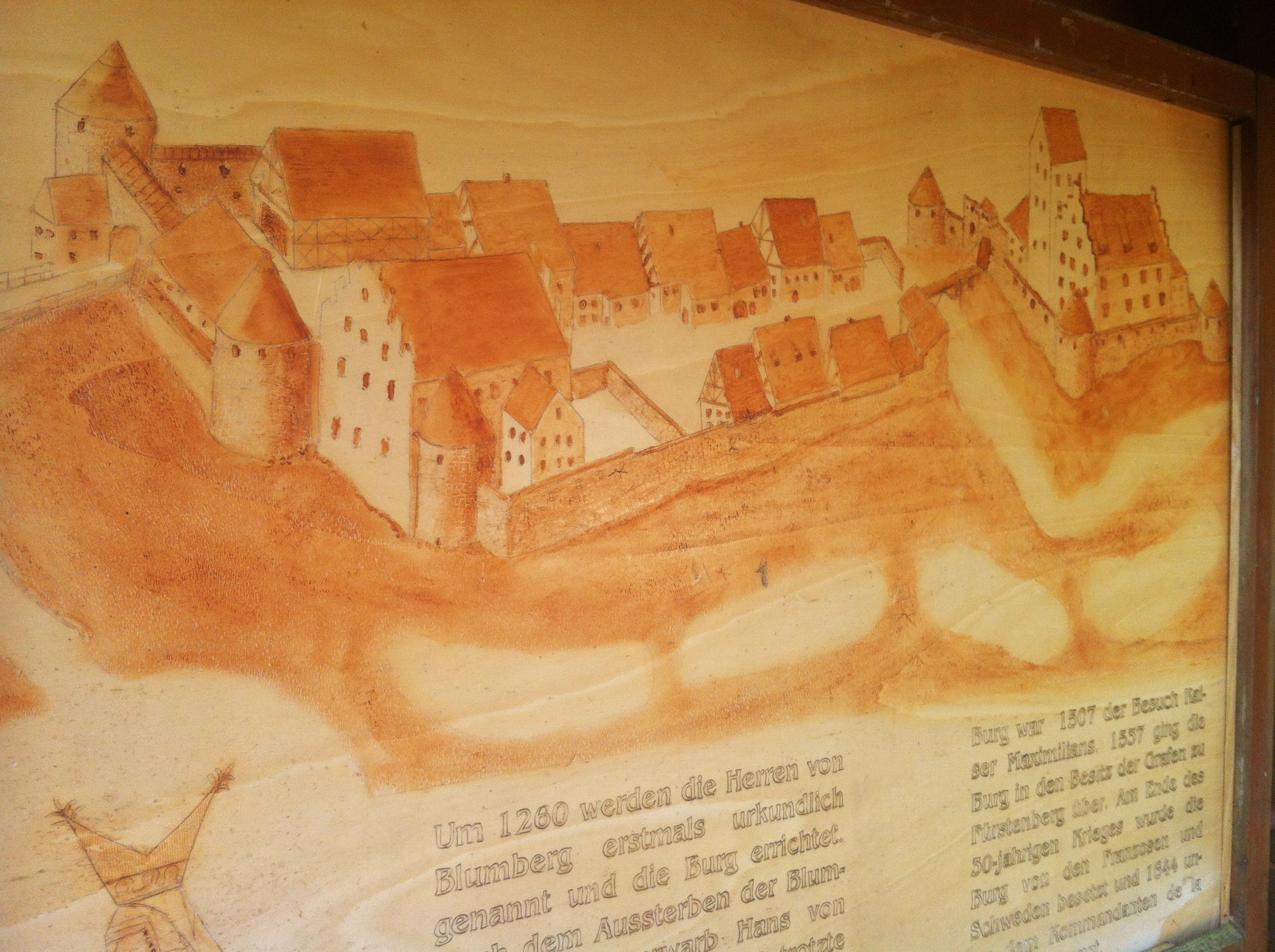 Geschichte der Stadt Blumberg im Schwarzwald-Baar-Kreis. Zeichnung von Burg Blumberg mit dem Dorf (Vorburg) auf der Infotafel an der Stelle der ehemaligen Burg. Anmerkung: Die Bildbezeichnung ist nicht korrekt — richtig ist: „Burg & Stadt (Vorburg)“.